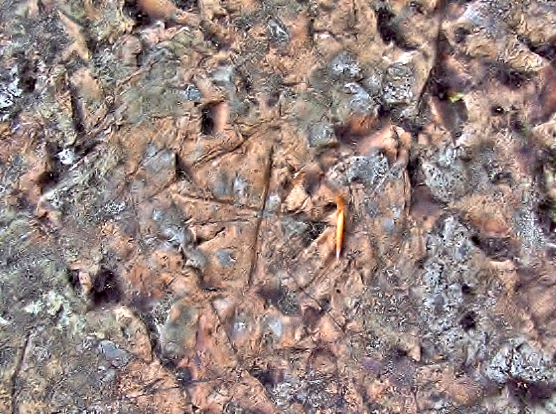 Pétroglyphe sur la pierre écrite. Massif du ballon d'Alsace. Territoire de Belfort